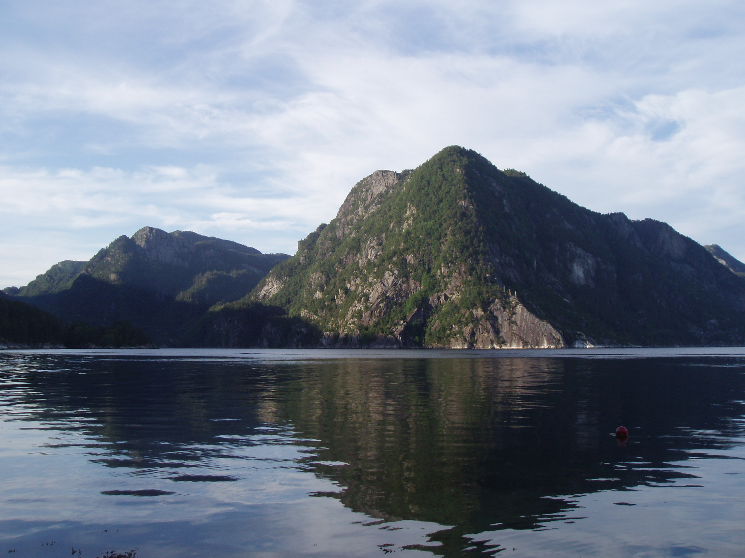 Sævareidfjorden in Fusa, Hordaland, Norway.